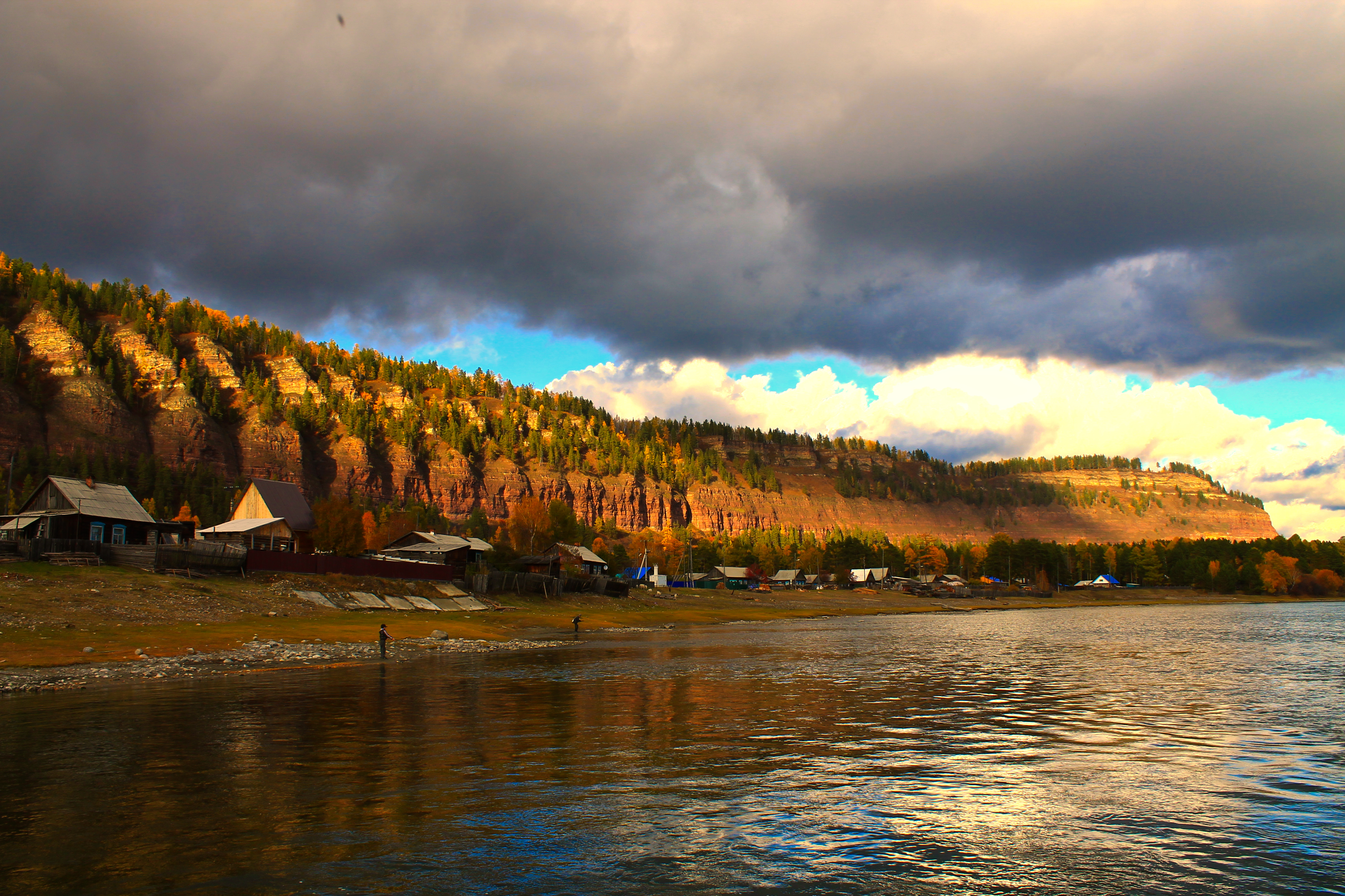 Утес Шаманский, Шелеховский район This image is related to the protected area of Russia number 3810474